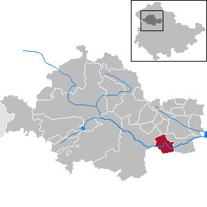 Großvargula in Thuringia - Unstrut-Hainich-Kreis